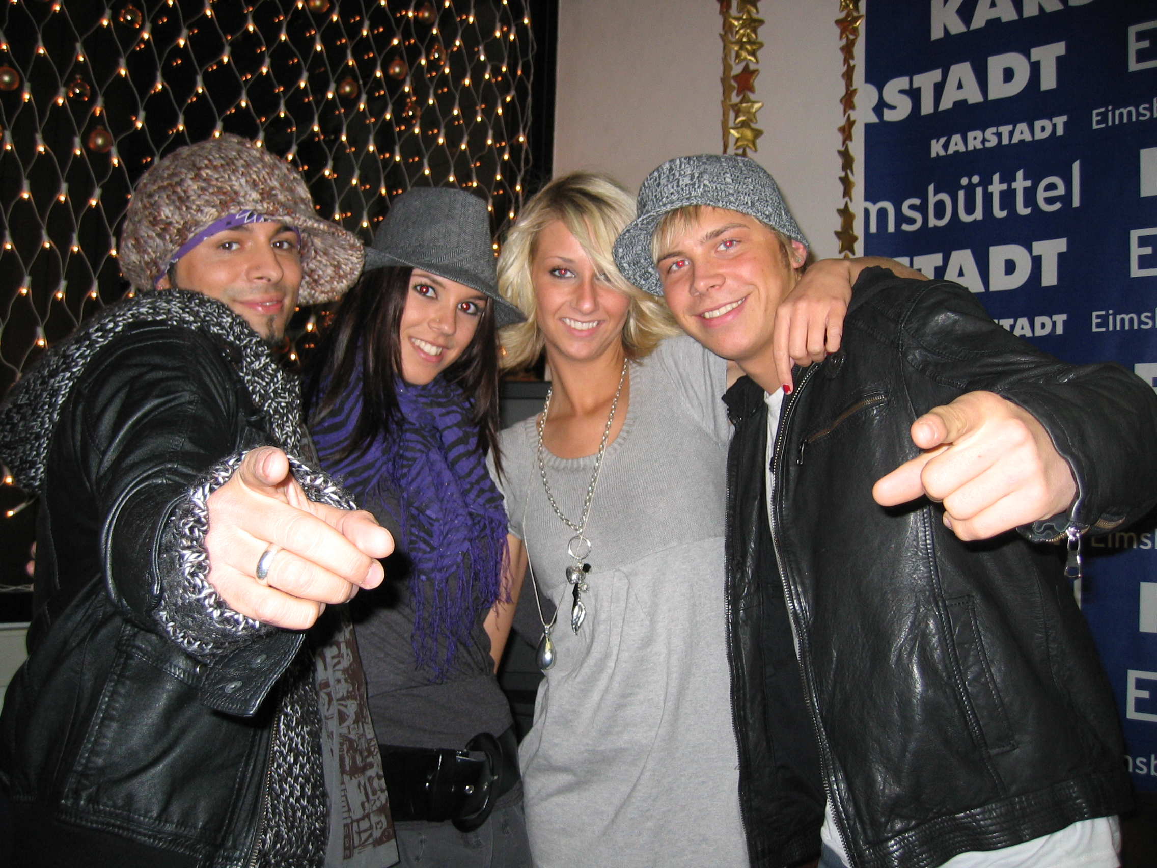 beFour in Hamburg-Eimsbüttel, Germany beFour in Hamburg-Eimsbüttel.